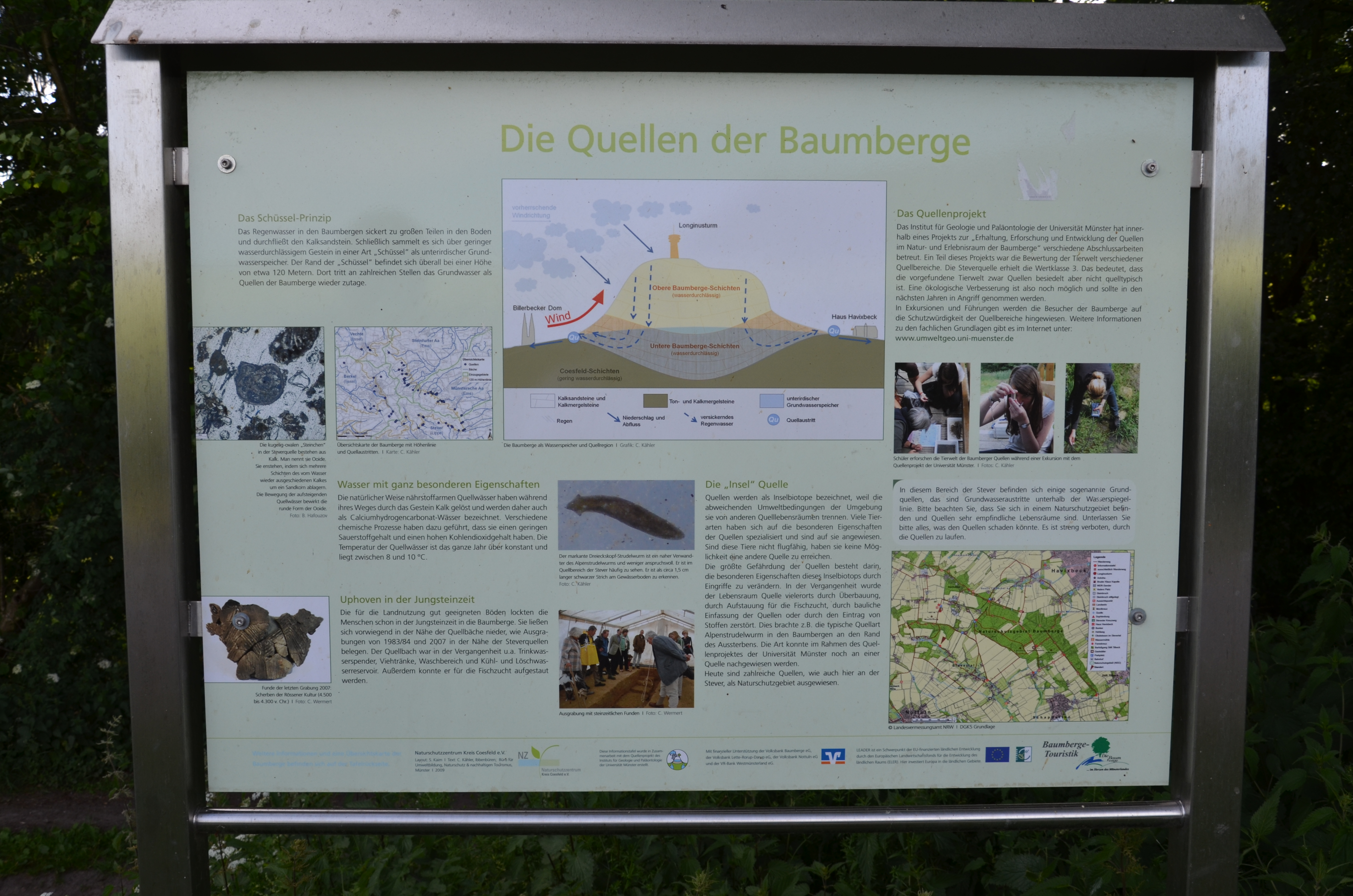 Oberlauf der Stever Informationstafel nahe einer der Grundquellen der Stever